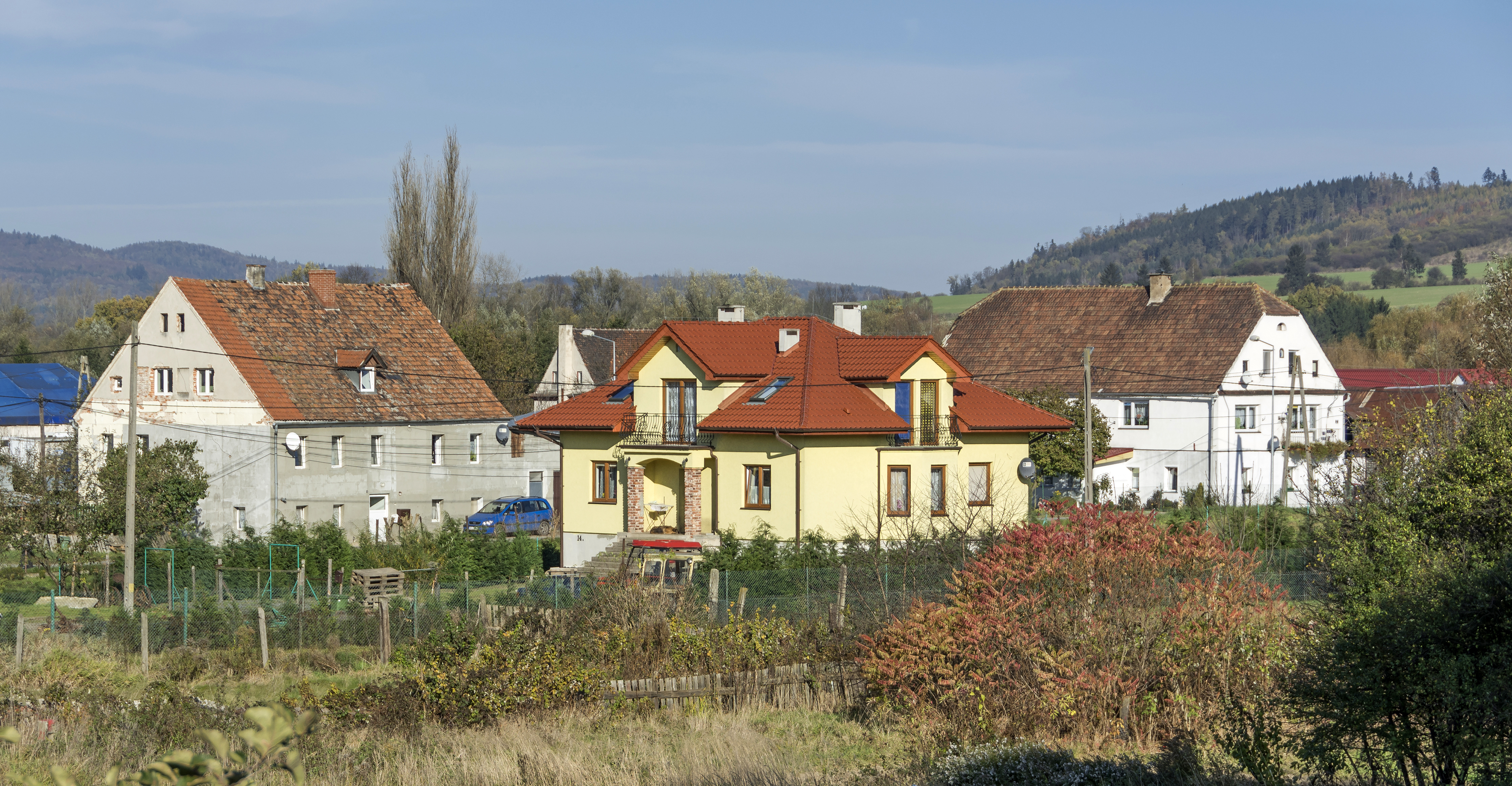 Kłodzko, ul. Półwiejska